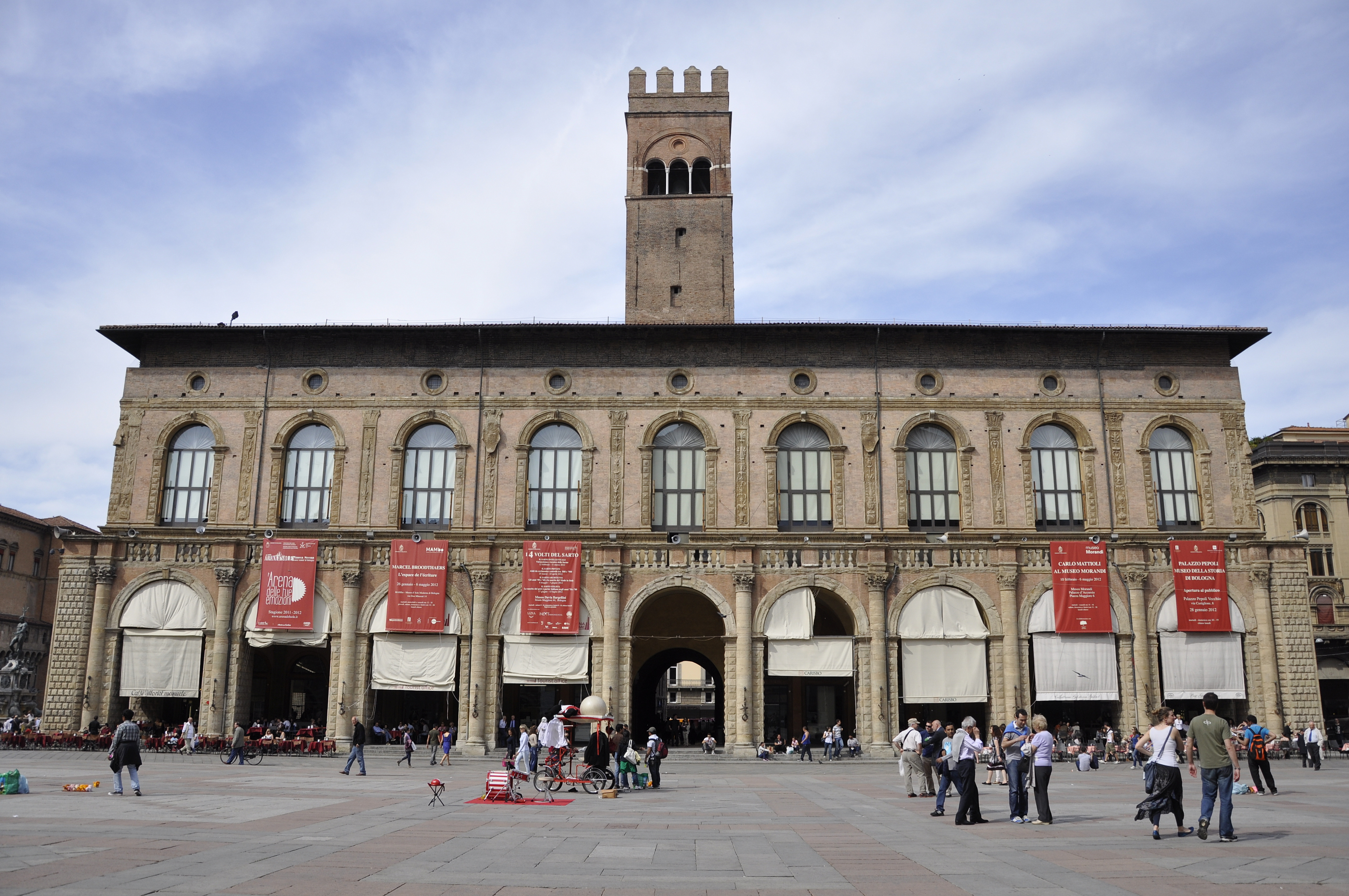 Palazzo del Podestà, Bologna